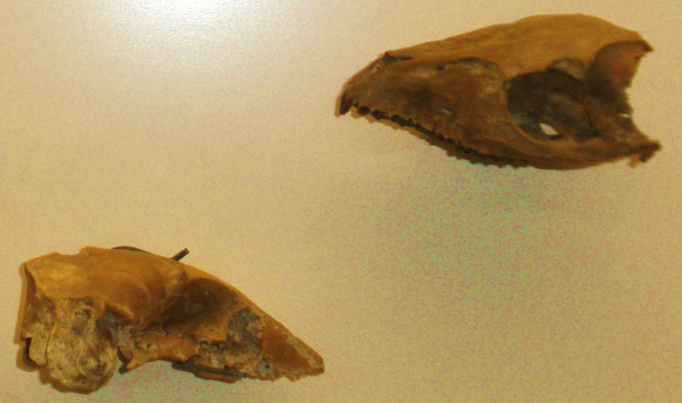 Fossil of Cainotherium, an extinct mammal -- Took the photo at Natural History Museum, London